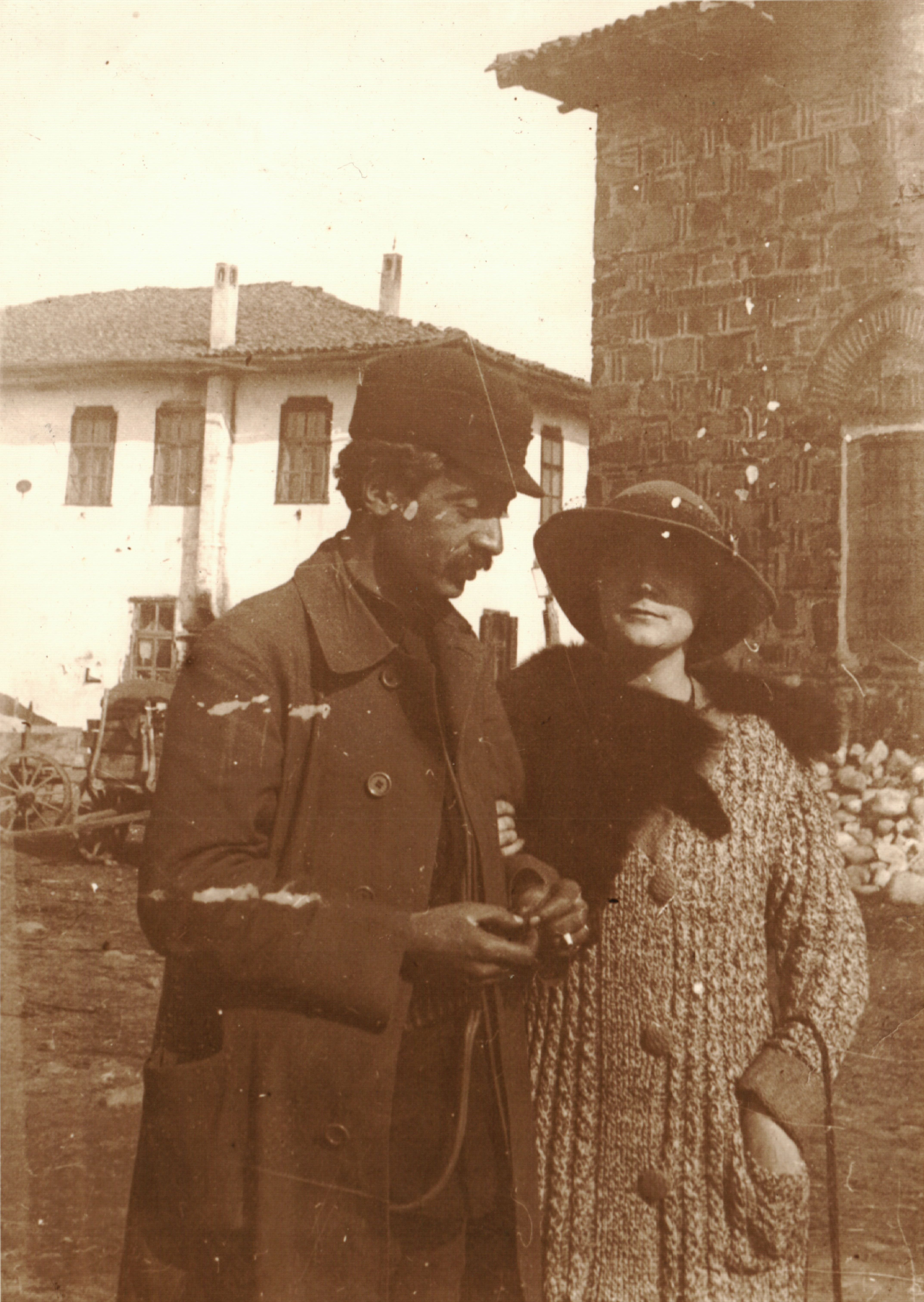 Снимка на Лора Каравелова, Пейо Яворов и Дора Конова, направени по време на посещението на двете жени в Самоков, където се е намирал Яворов с четата си.